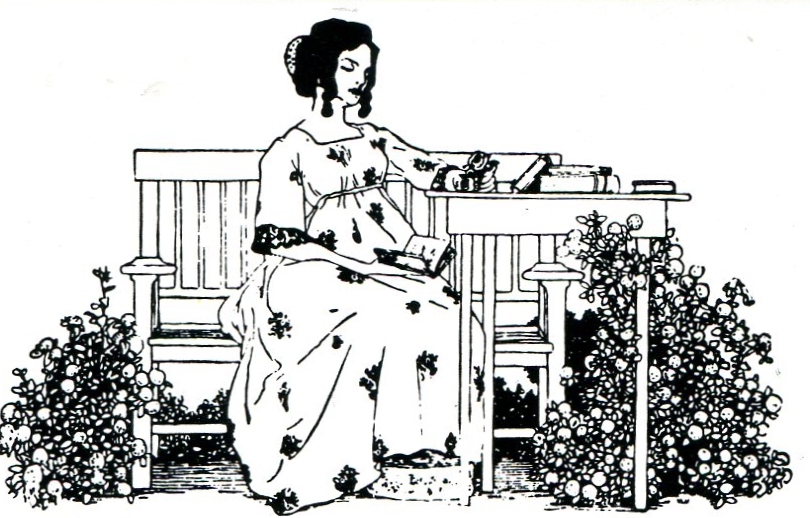 Zeichnung Heinrich Vogelers für Auguste Hauschners Roman "Zwischen den Zeiten"